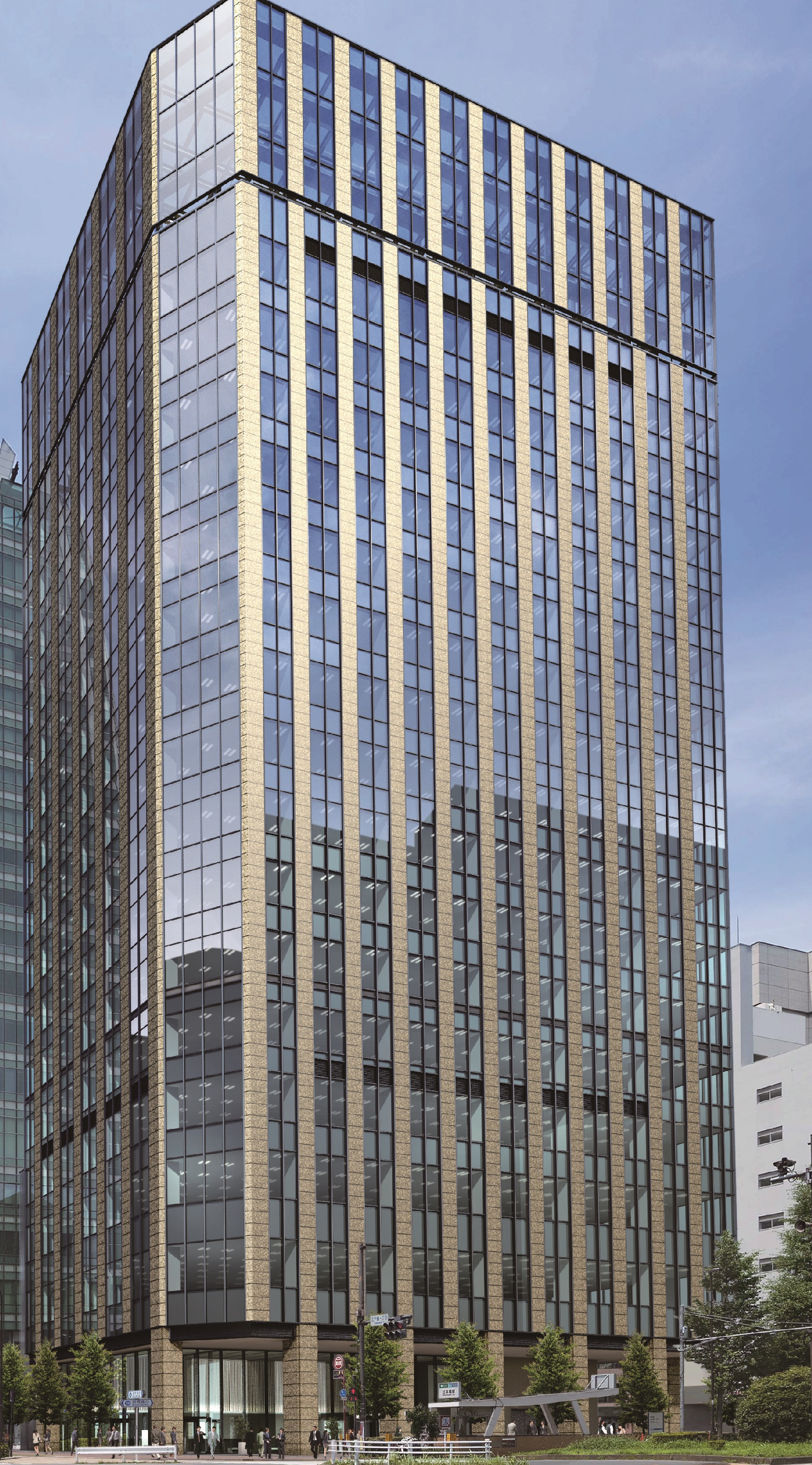 日鉄日本橋ビル